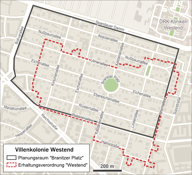 Karte Villenkolonie Westend in Berlin-Westend mit dem Planungsraum Branitzer Platz und dem Erhaltungsgebiet Westend